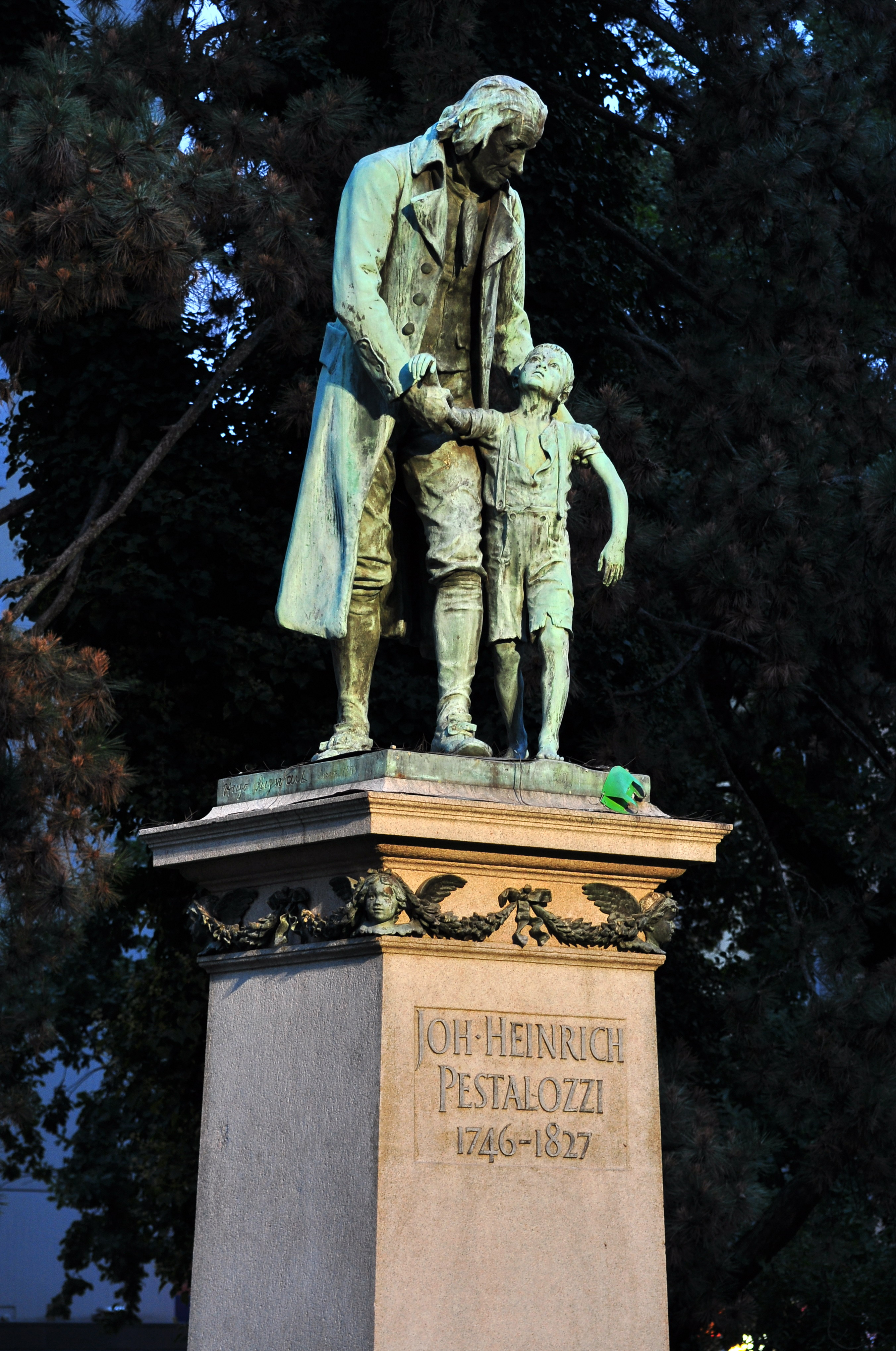 Pestalozziwiese (Bahnhofstrasse) in Zürich (Switzerland)